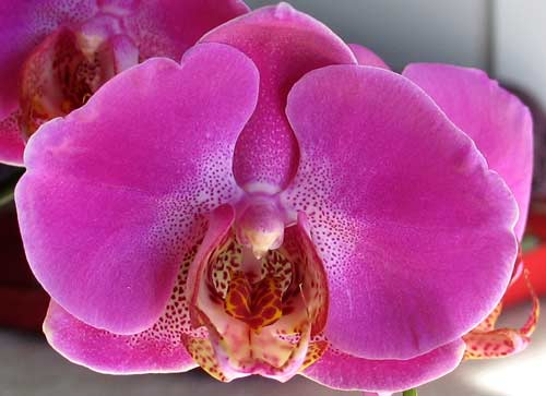 Phalaenopsis hybrid